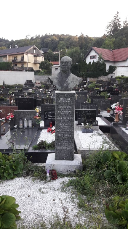 Grob obitelji Hrčić na groblju u Samoboru